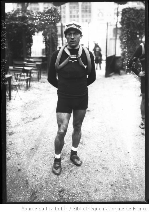 Paris-Tours 1913 : portrait du coureur cycliste Carlo Oriani avant le départ